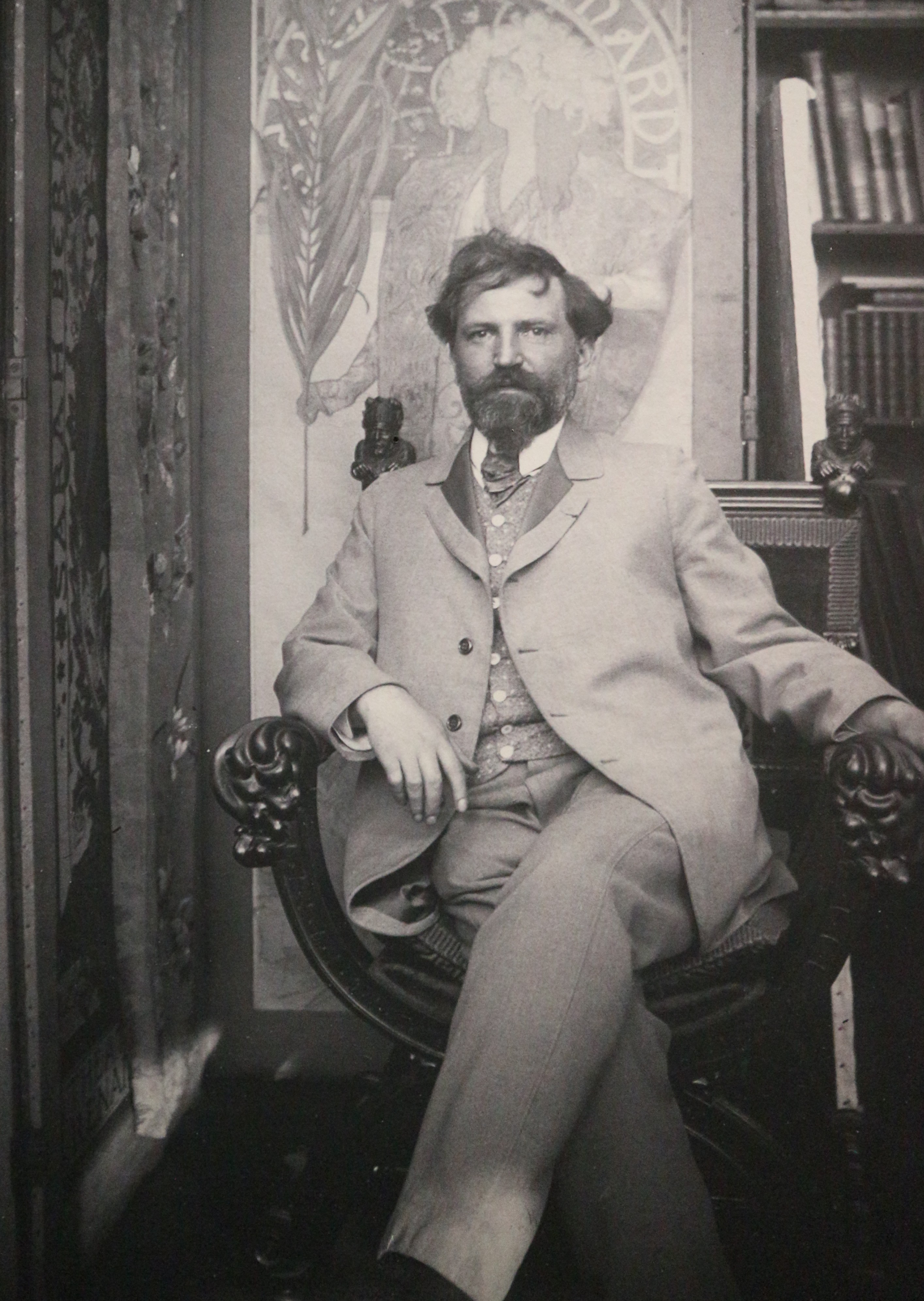 Autoportrait d'Alfons Mucha, devant une affiche destinée à Sarah Bernhardt, dans son atelier situé rue du Val-de-Grâce à Paris, vers 1901 (Exposition Mucha au musée du Luxembourg, Paris, 2018).